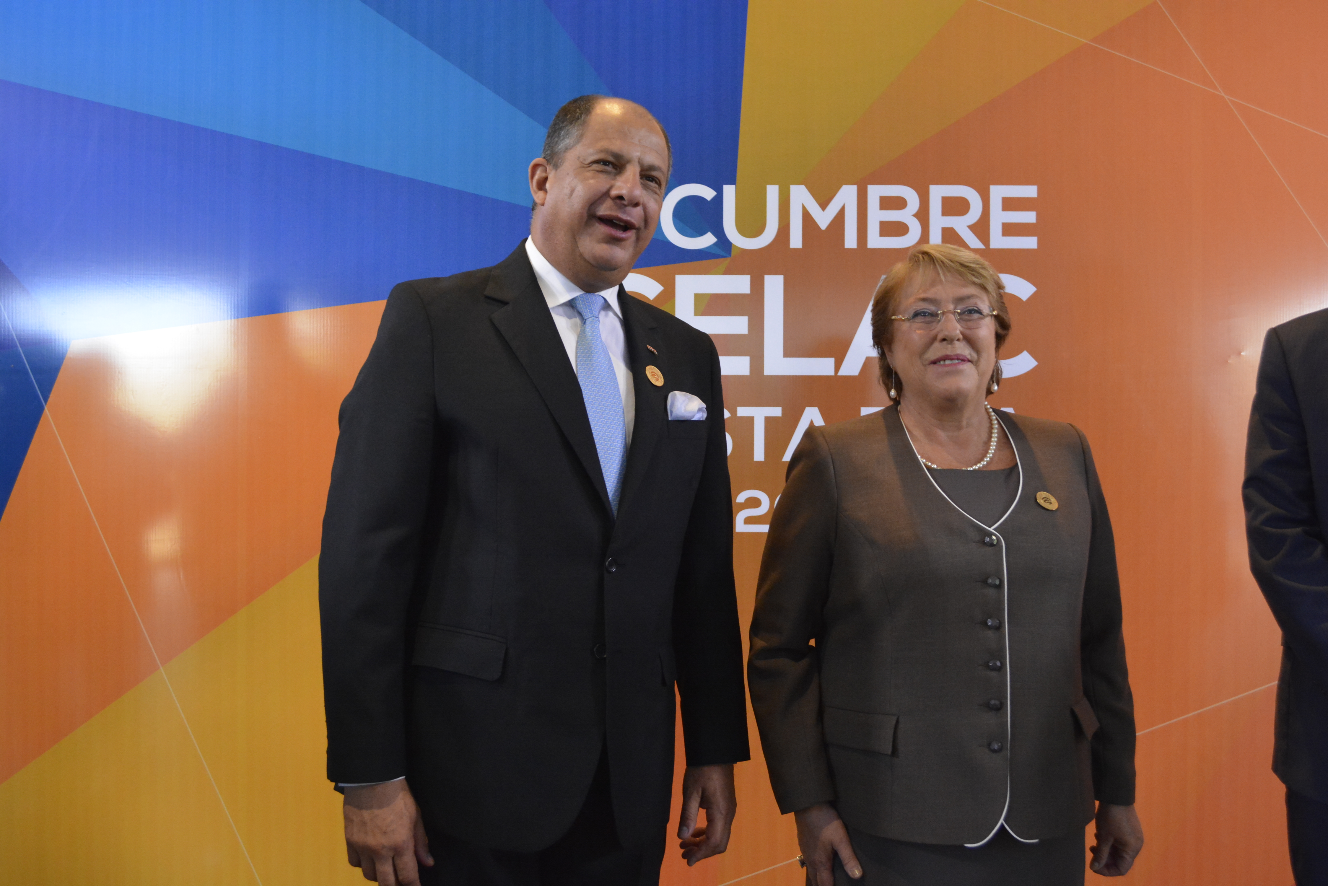 Llegada de varios jefes de Estado y de Gobierno a Costa Rica para la III Cumbre de la CELAC.